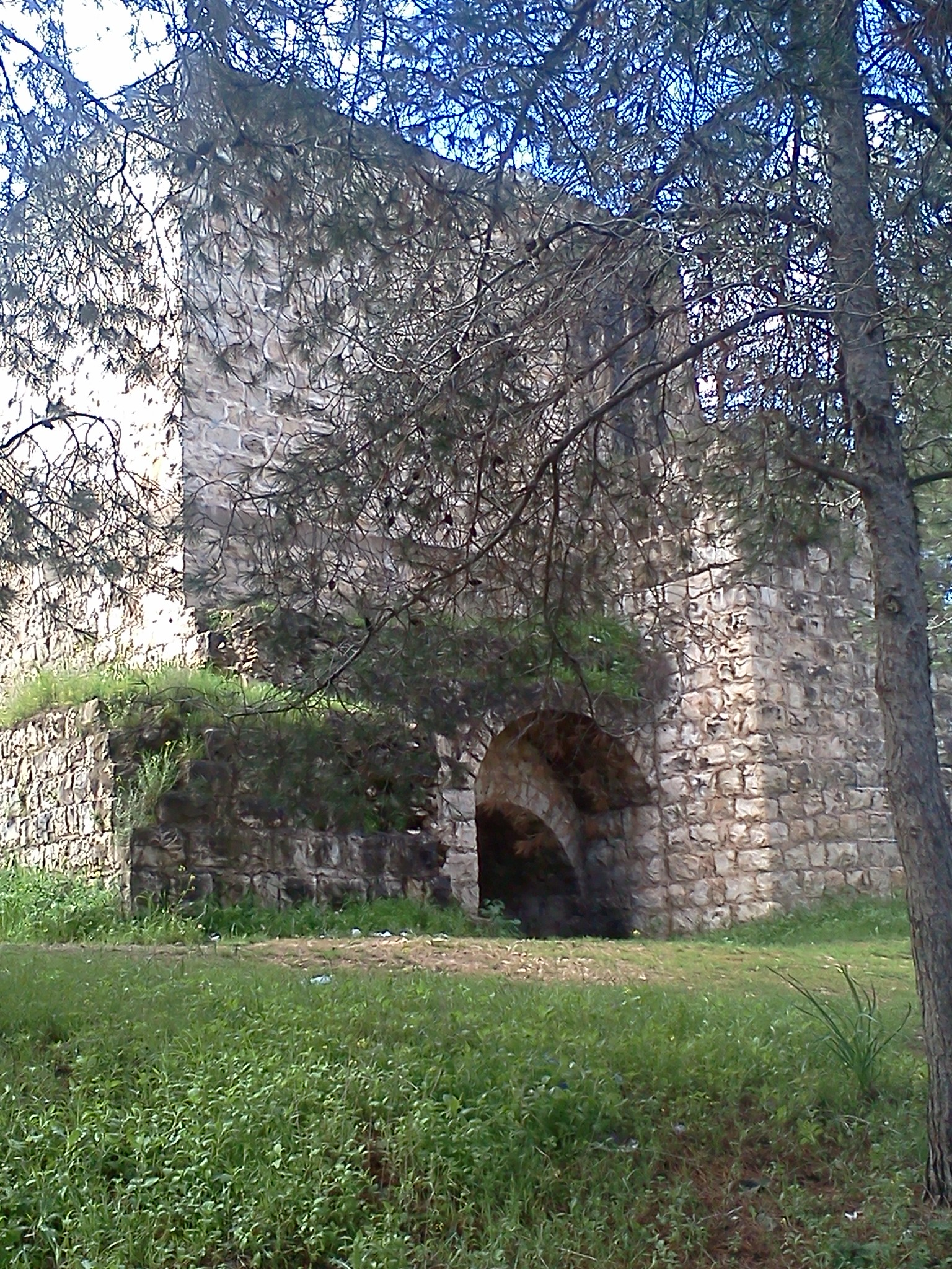 נחל ויער נחשונים כבשן סיד